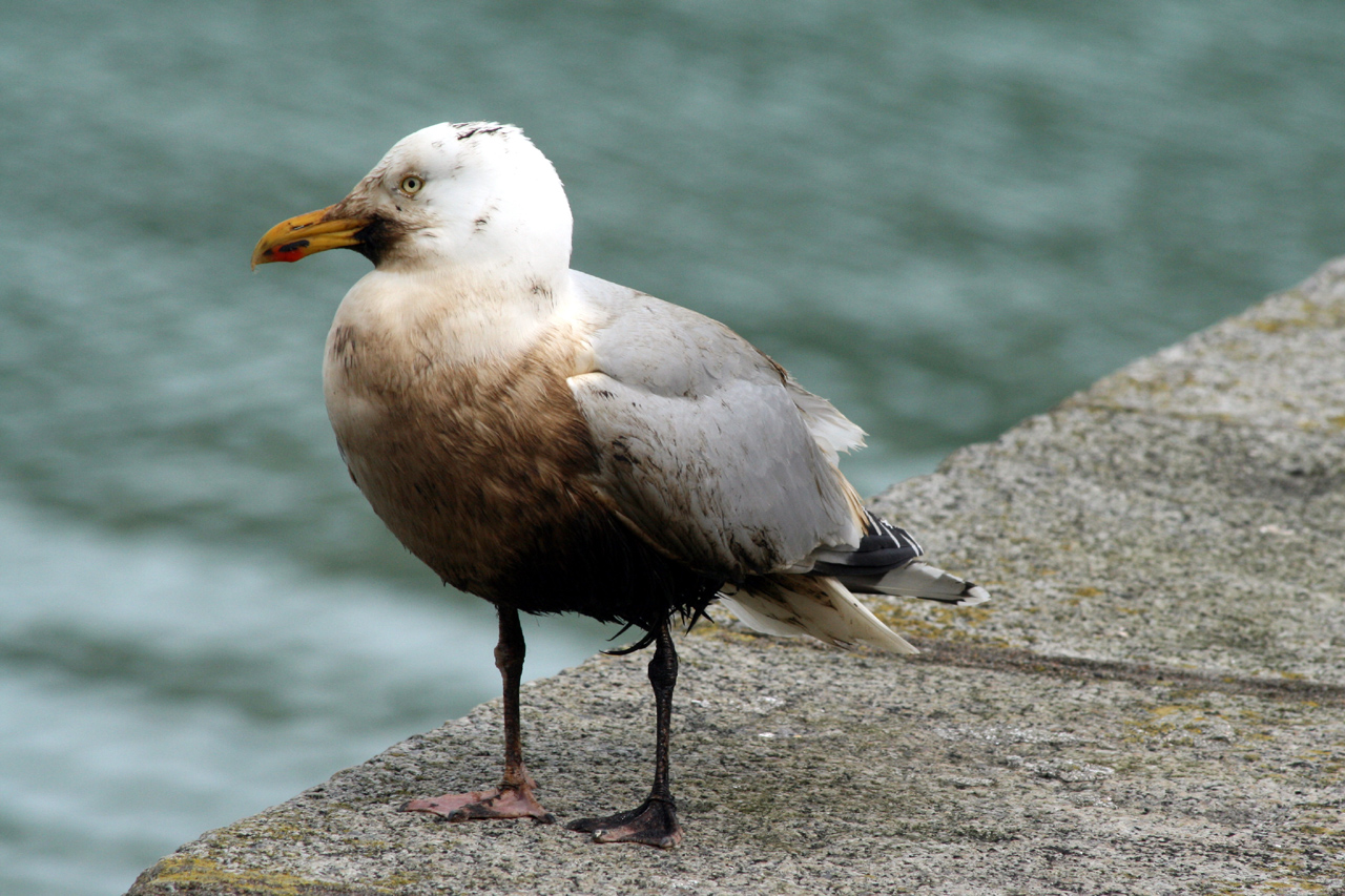 Goeland